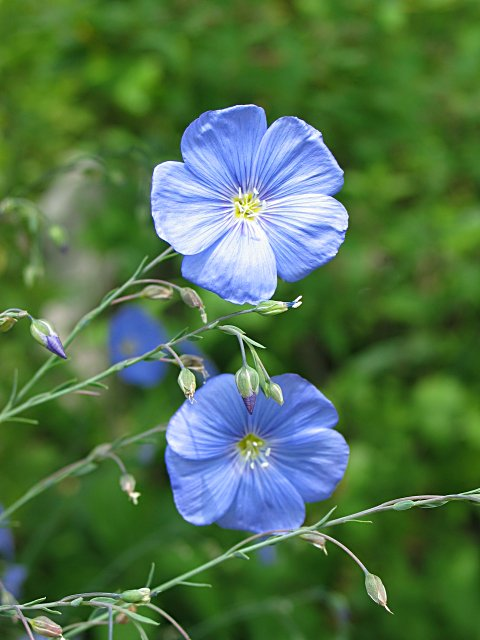 Echter Lein im Frühsommer)